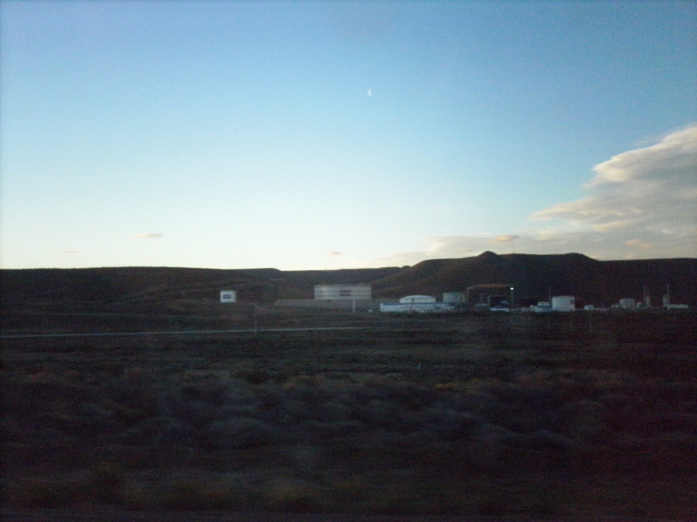 IMAGEN DE LA LOCALIDAD DE CAÑADON Y TANQUES ALMACENADORES DE CRUDO DE YPF